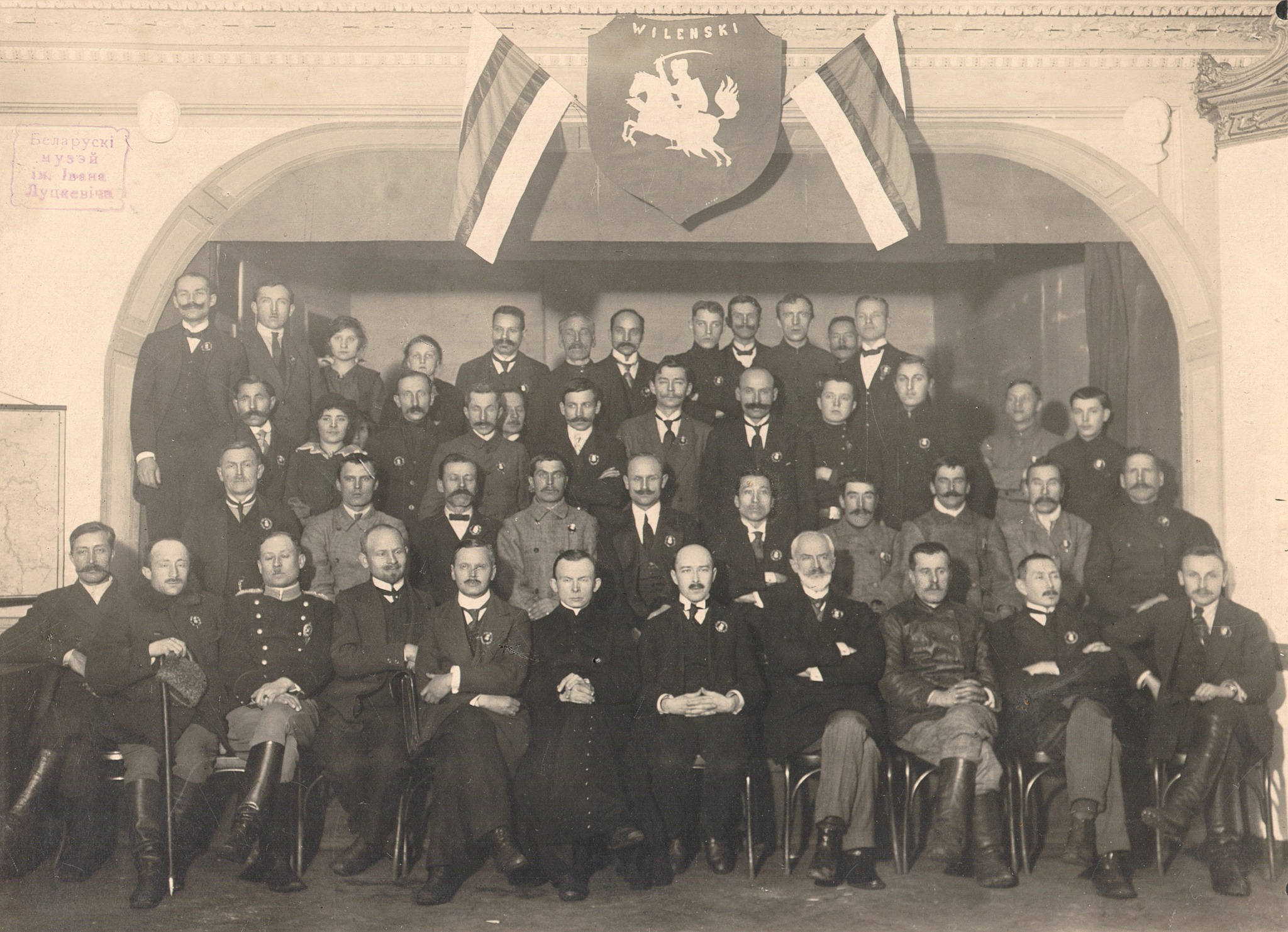 Беларуская (тарашкевіца): Удзельнікі Беларускай канфэрэнцыі 25-27 студзеня 1918 году, Вільня